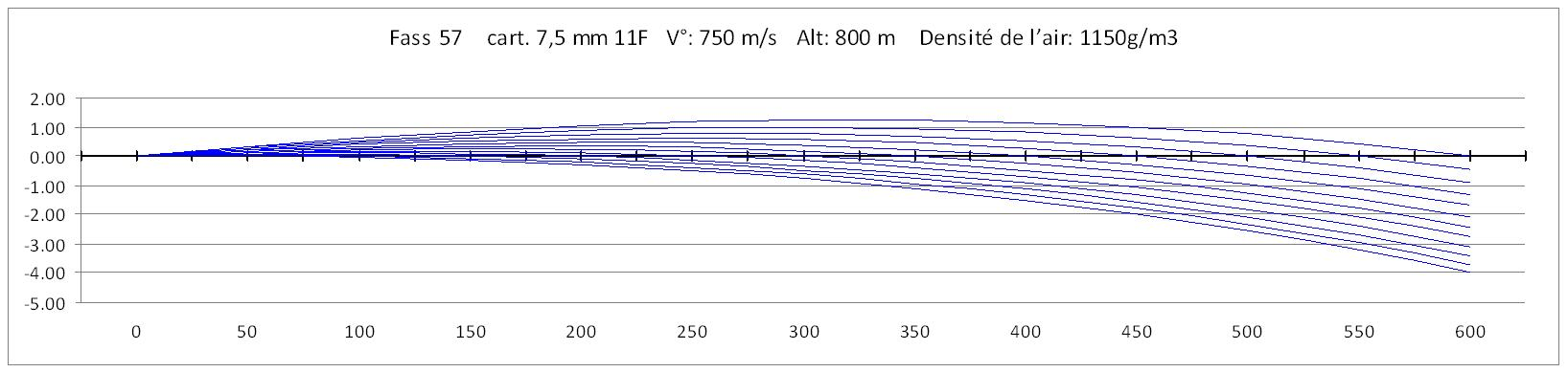 Graphique des ordonnées en m des cartouches 11 pour Fass57